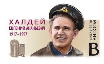 Евгений Халдей, почтовый конверт